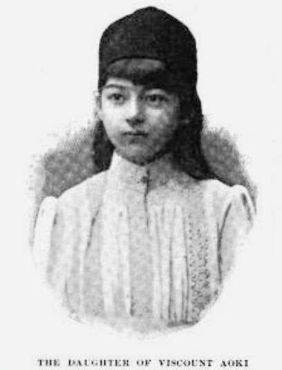 青木周蔵の娘、ハナ